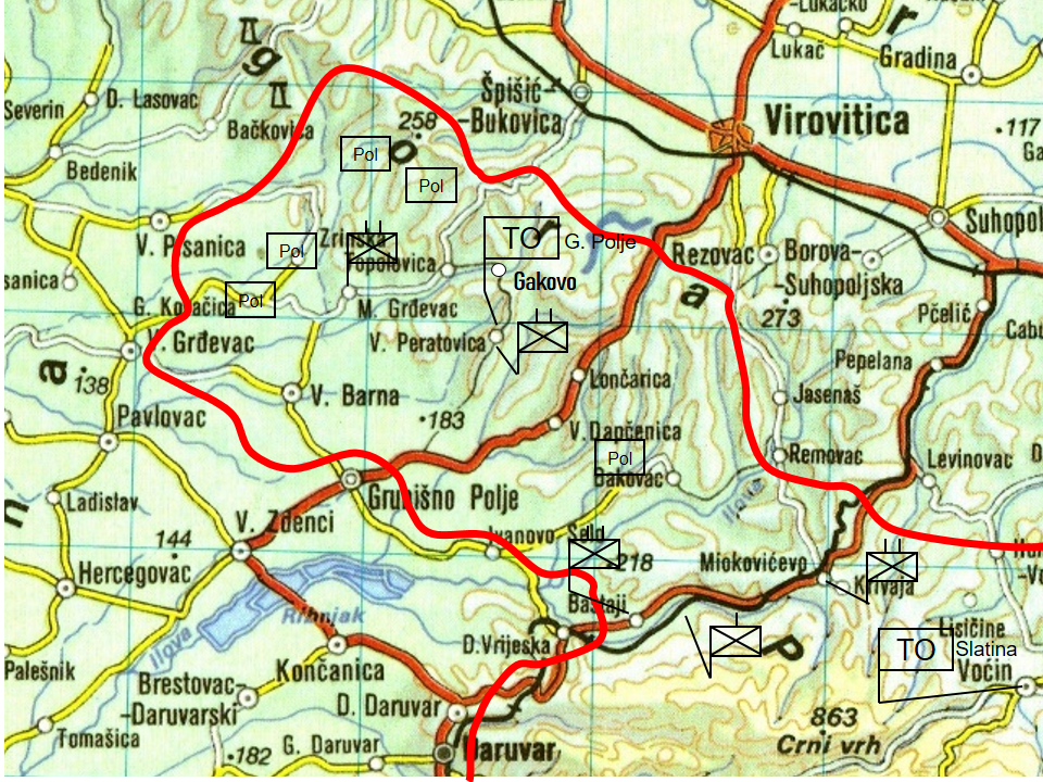 Elaborado sobre la base de Petar, Bašić; Ivica, Miškulin (29 de septiembre de 2010). «The chronicles of Grubišno Polje 1990-1991 (Part II)». Scrinia Slavonica (en croata) 10 (1). ISSN 1332-4853. Consultado el 30 de septiembre de 2018